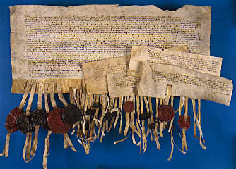 De Stichtse Landbrief, een schriftelijke vastlegging in 1375 van de rechten en plichten binnen het Nedersticht tussen de geldnood verkerende bisschop van Utrecht als vorst, en de geestelijken, edelen en Stad en steden die vertegenwoordigd waren in een raad.